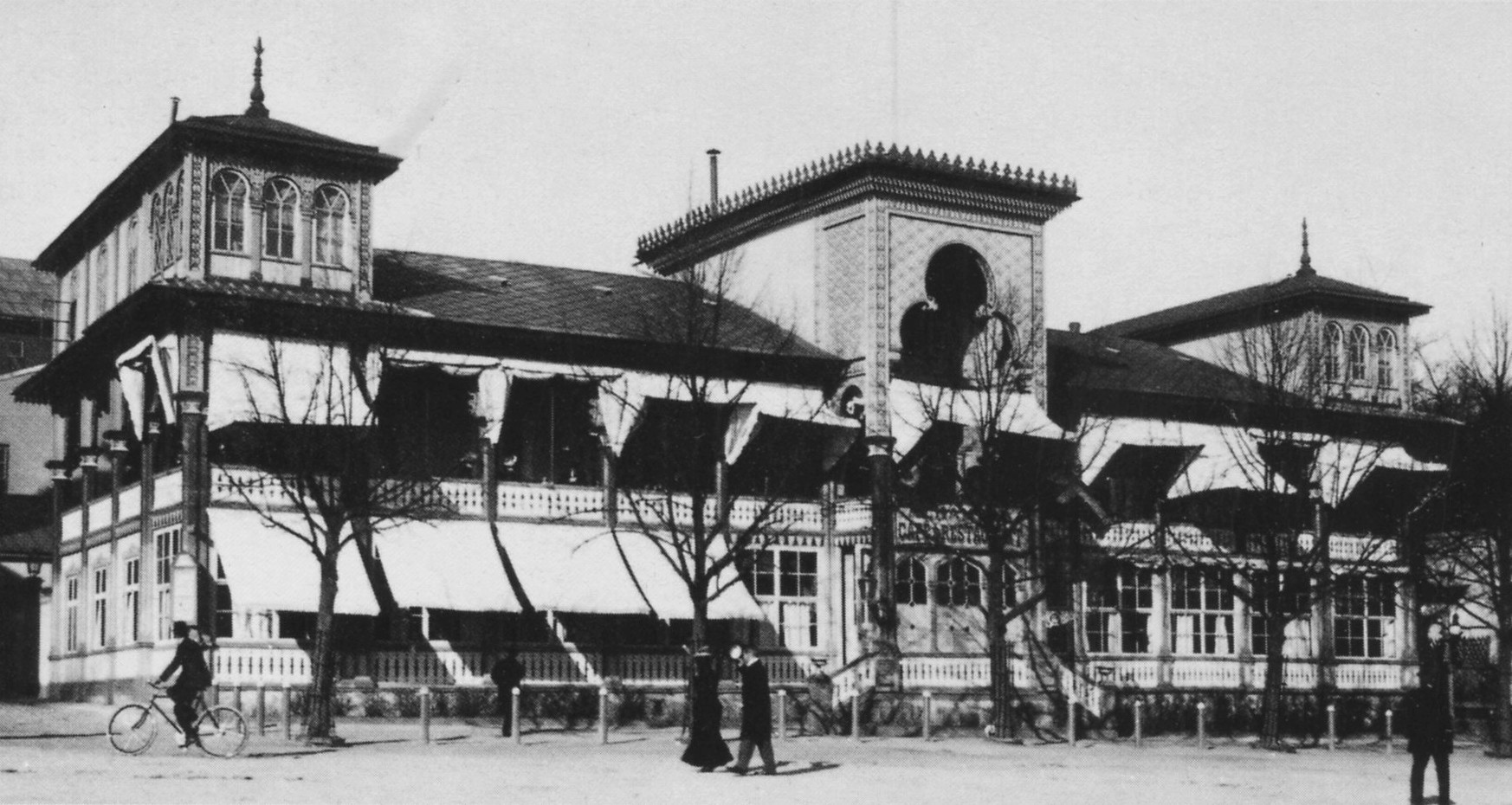 Restaurang Alhambra, Djurgården